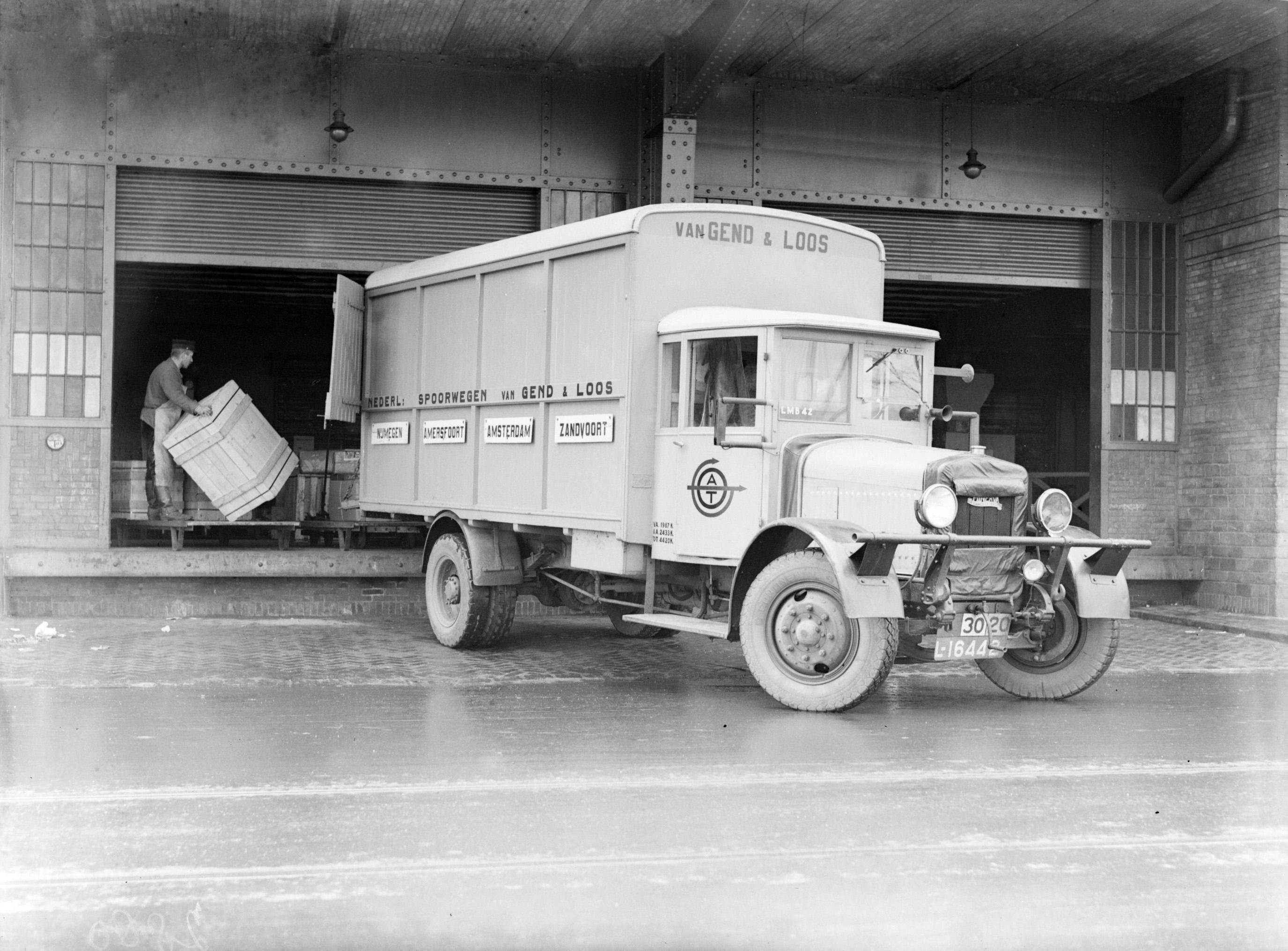 Collectie / Archief : Fotocollectie Van de Poll Reportage / Serie : Reportage Nederlandse Spoorwegen Beschrijving : Vrachtauto van Van Gend en Loos vertrekt van het station in Amsterdam Datum : 1933 Trefwoorden : centraal station, laden, spoorwegen, vrachtwagens Fotograaf : Poll, Willem van de, [onbekend] Auteursrechthebbende : Nationaal Archief Materiaalsoort : Glasnegatief Nummer archiefinventaris : bekijk toegang 2.24.14.02 Bestanddeelnummer : 189-0181